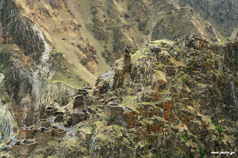 Khevsureti